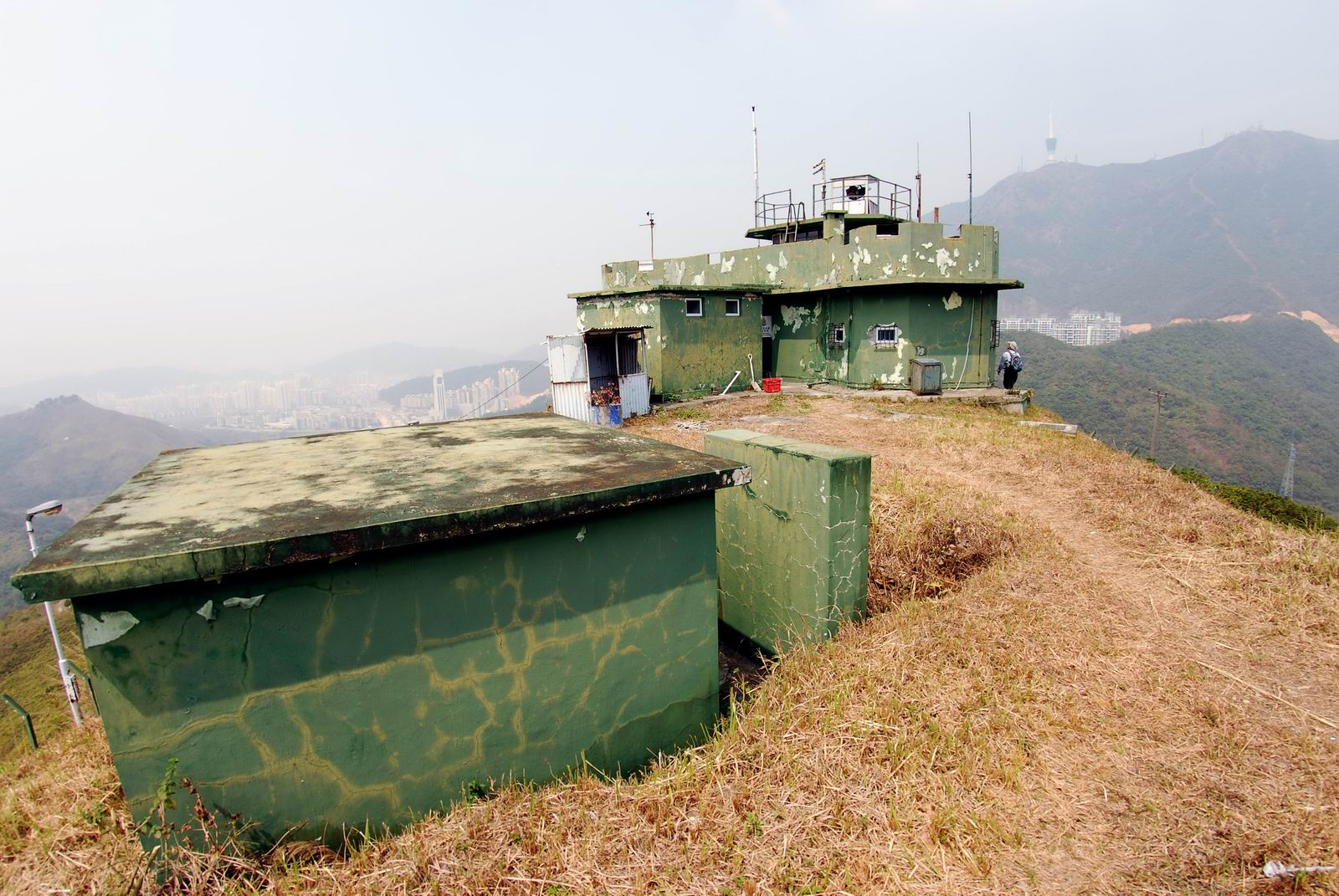 Kwong Shan Observation Post